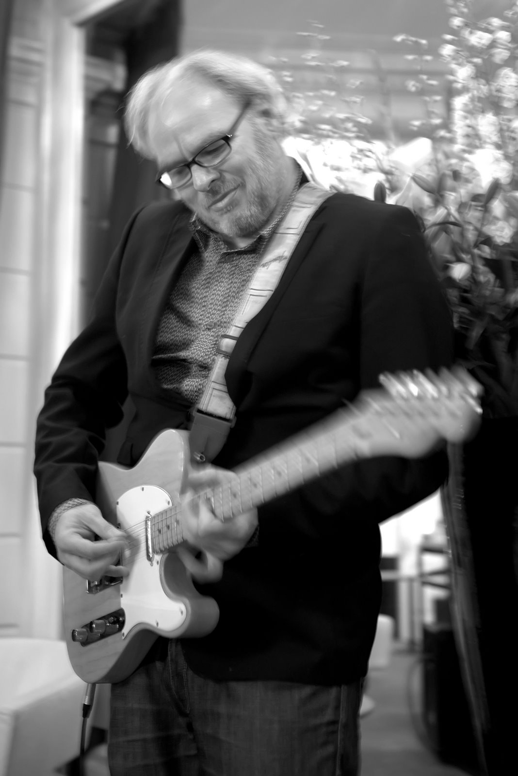 Culturele borrel in café-restaurant Stanislavski in de Stadsschouwburg, met Nico Dijkshoorn.